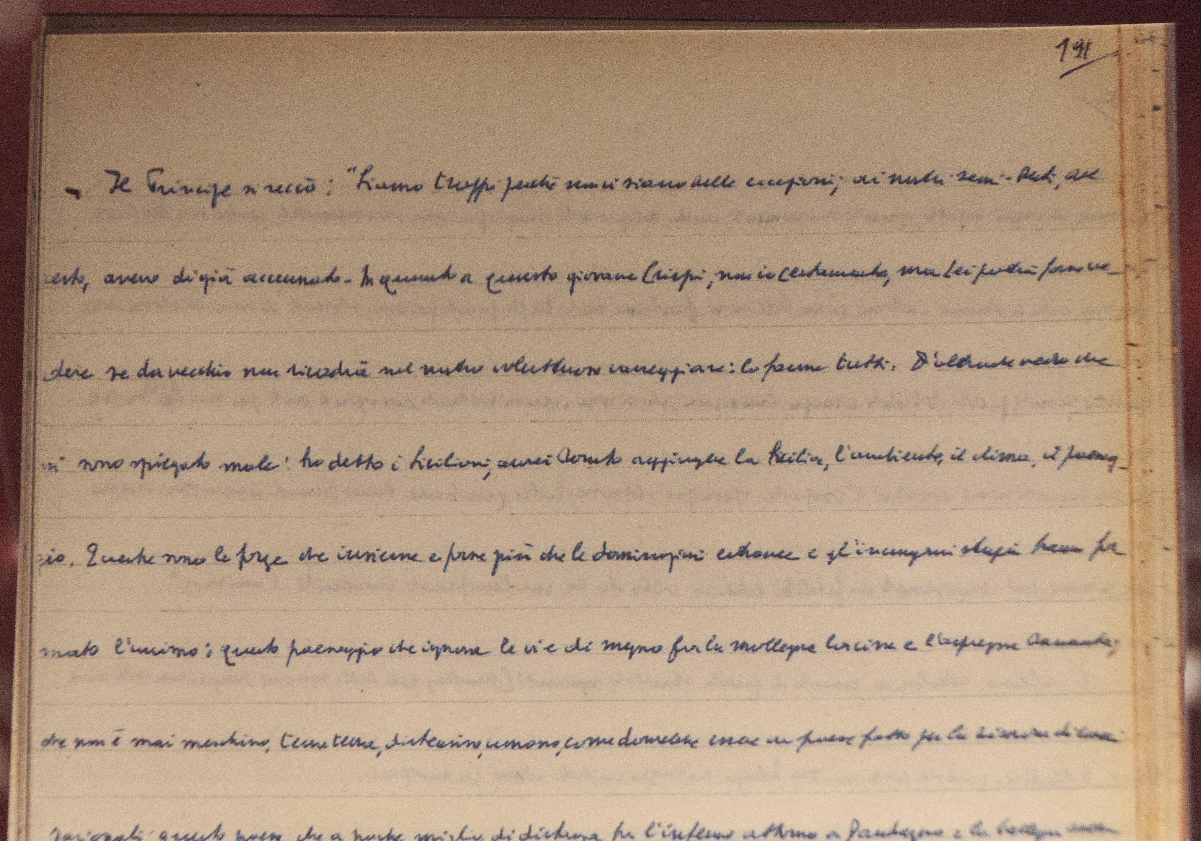 Manoscritto Gattopardo